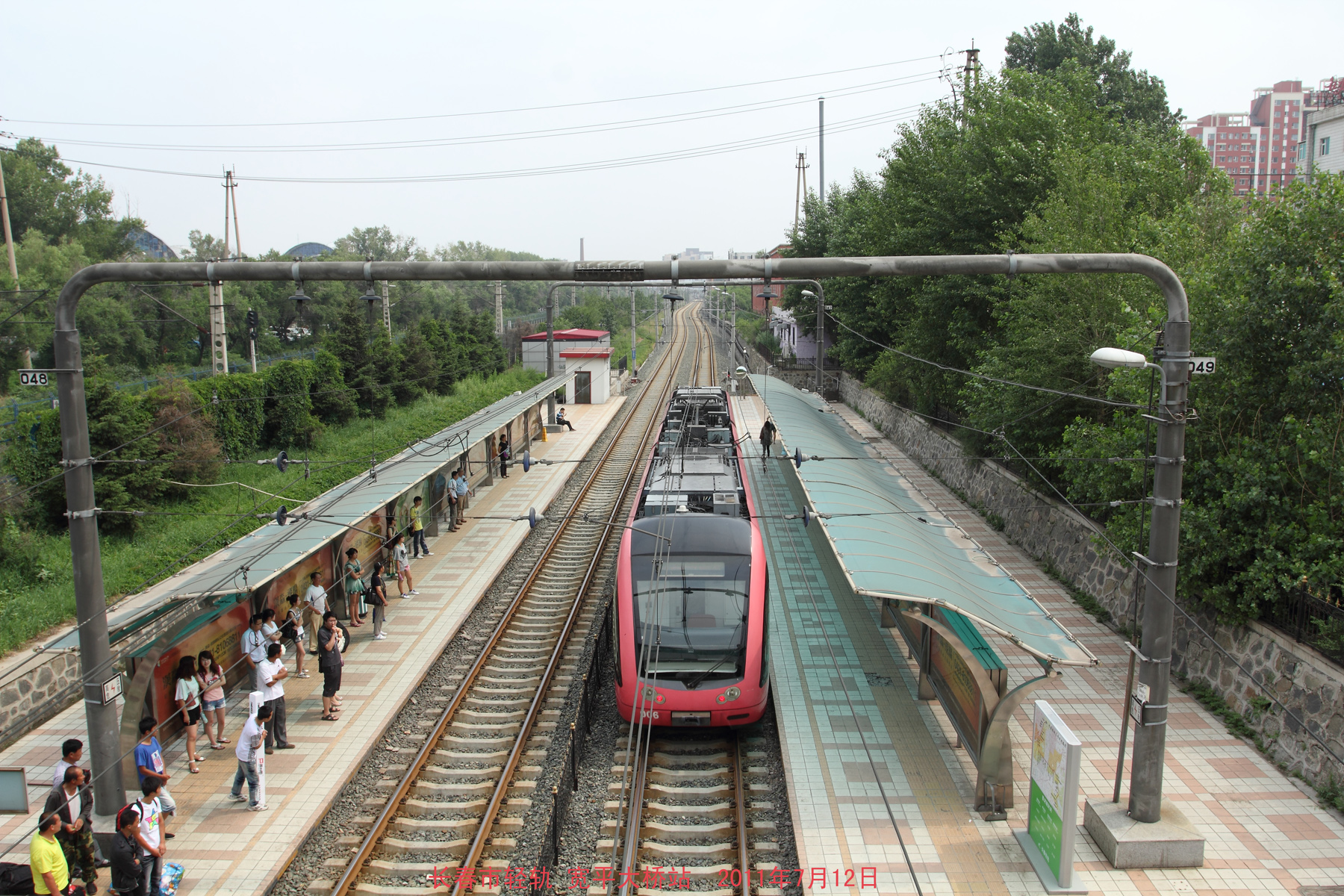 轻轨宽平大桥站 kuan ping da qiao station